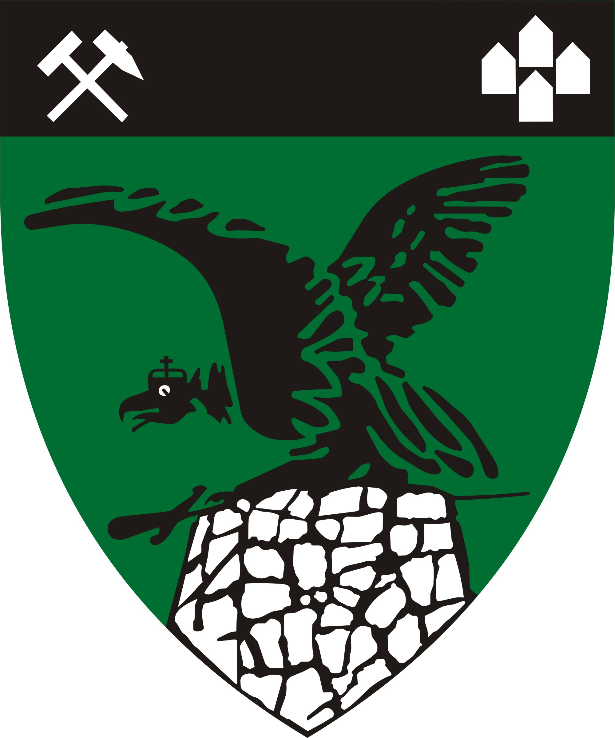 Tatabánya címere